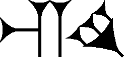 Cuneiform sign